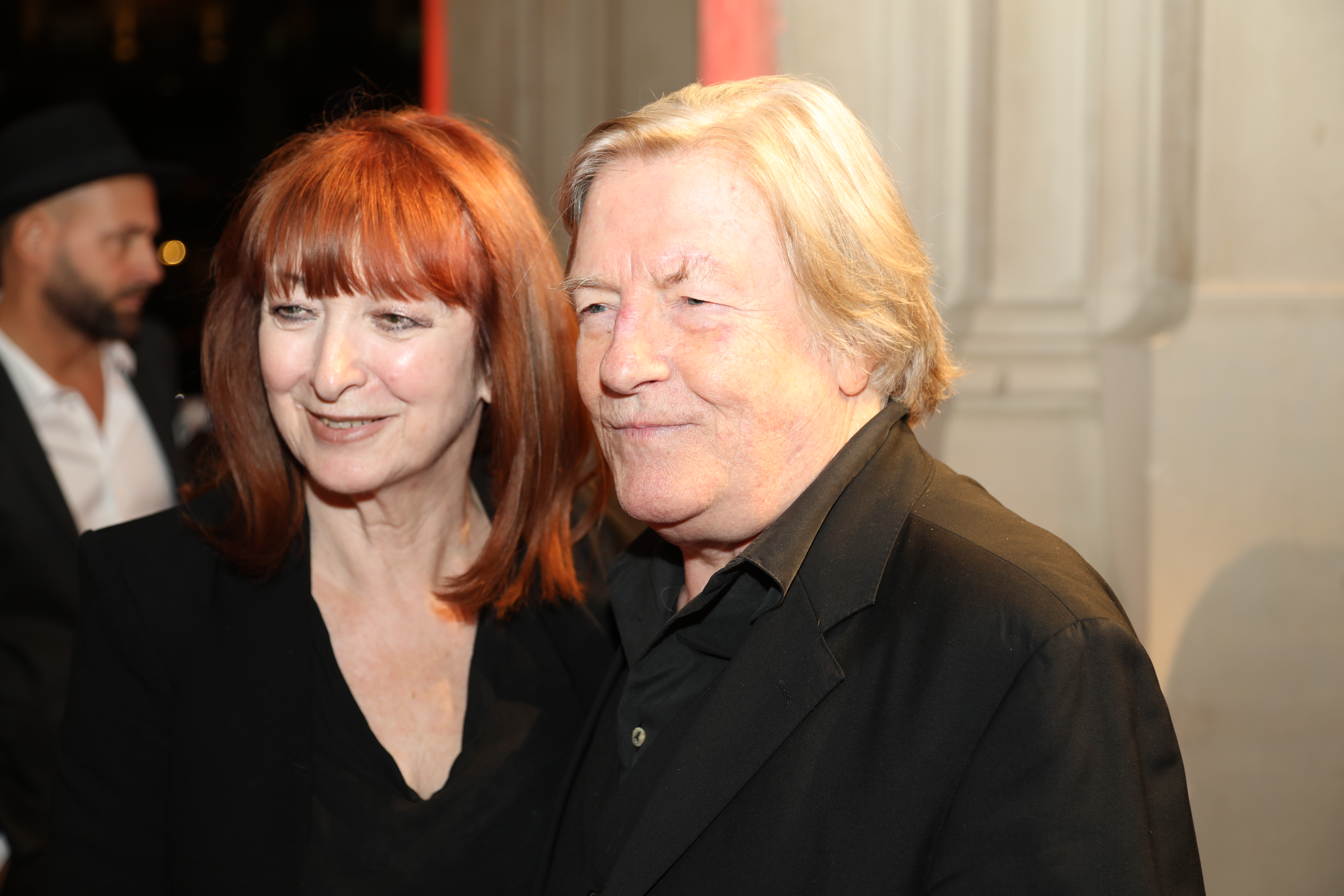 Manfred Zapatka beim Hessischen Film- und Kinopreis 2017